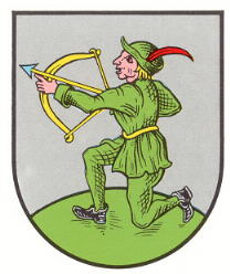 Wappen von Etschberg